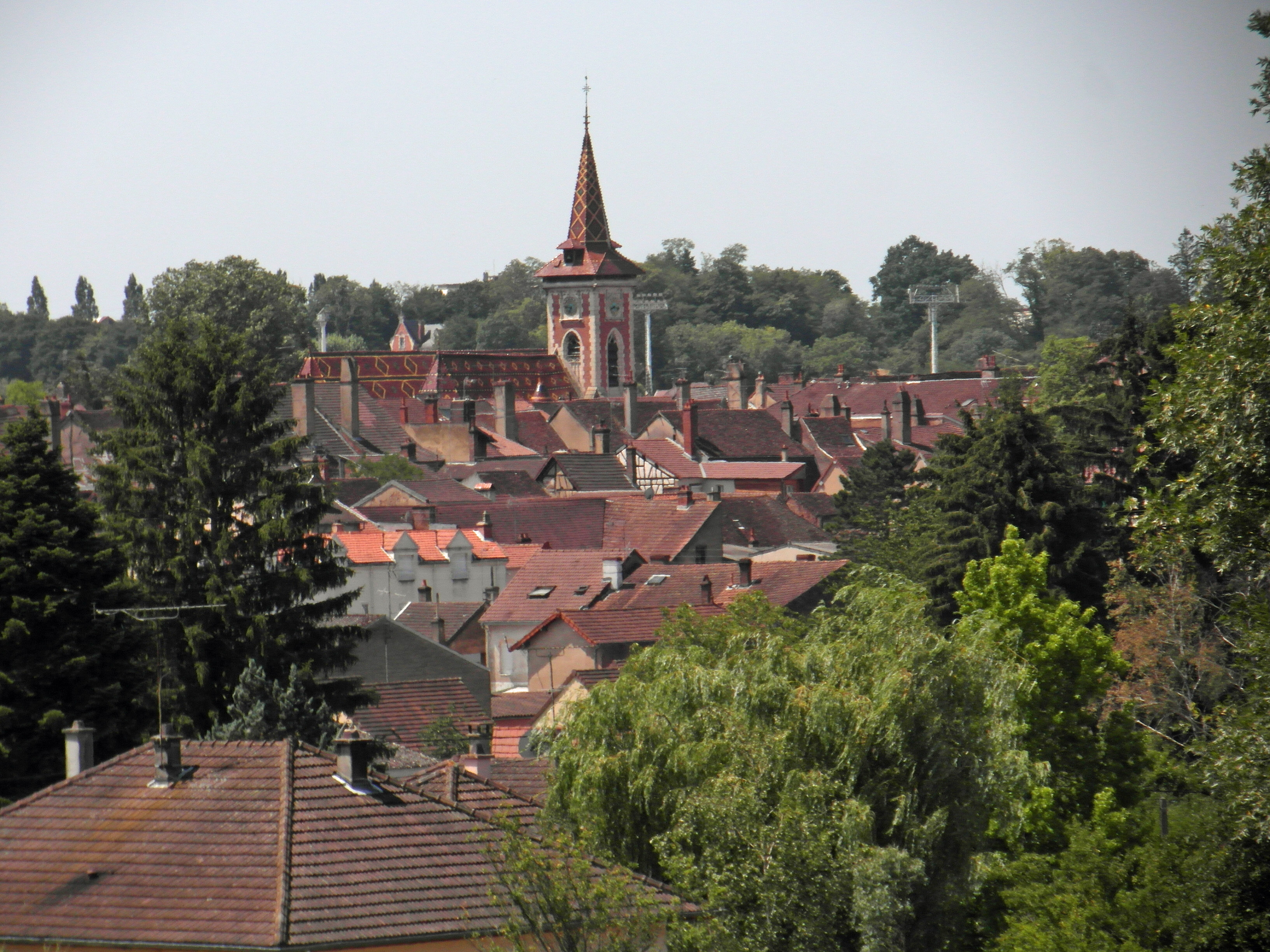 Vue sur Louhans